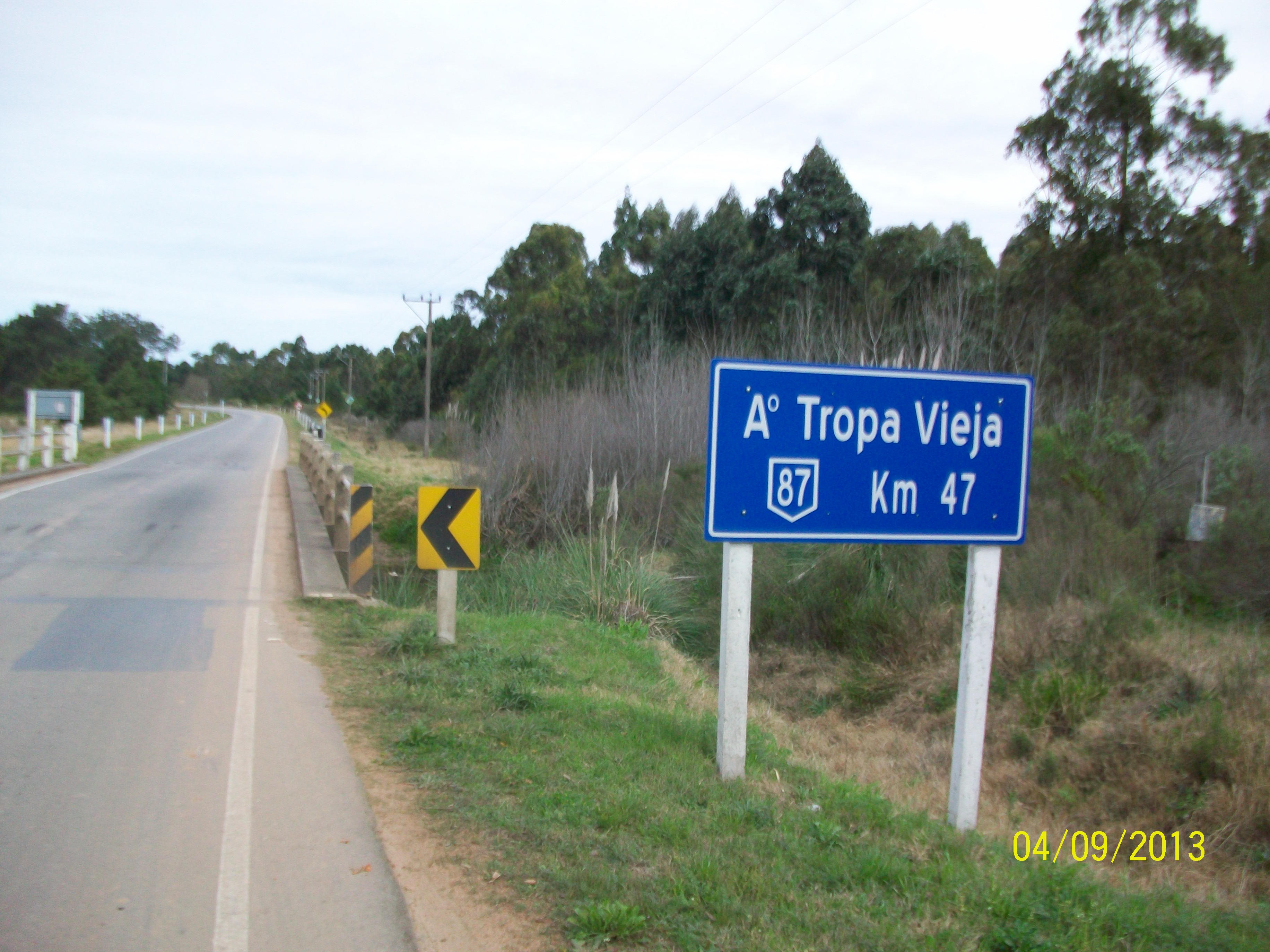 Vista Arroyo Tropa Vieja desde la ruta 87